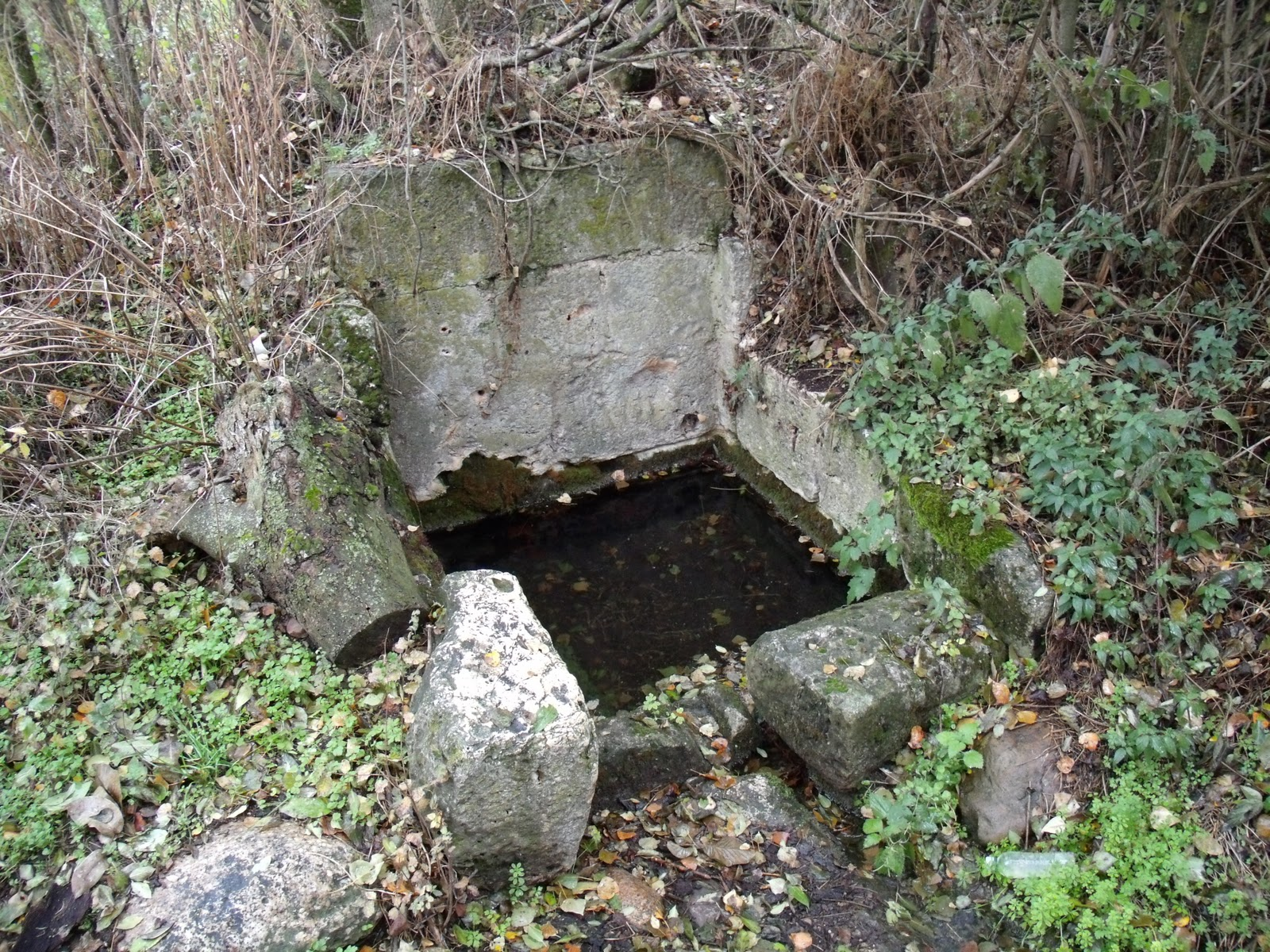 Fuente Mora